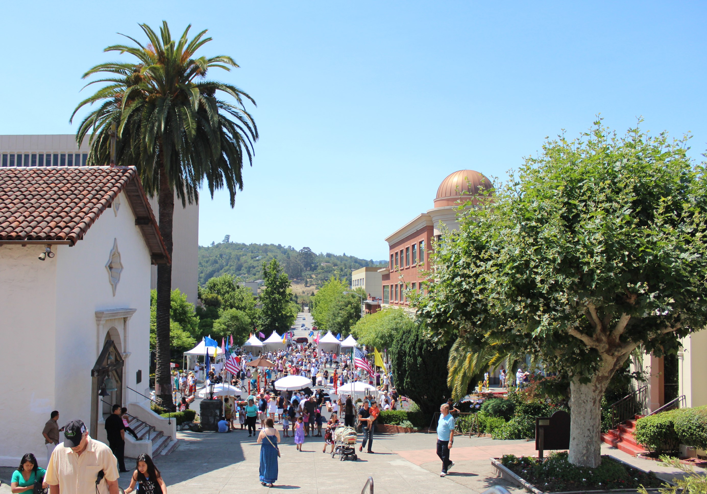 Mission San Rafael Arcángel, San Rafael CA USA